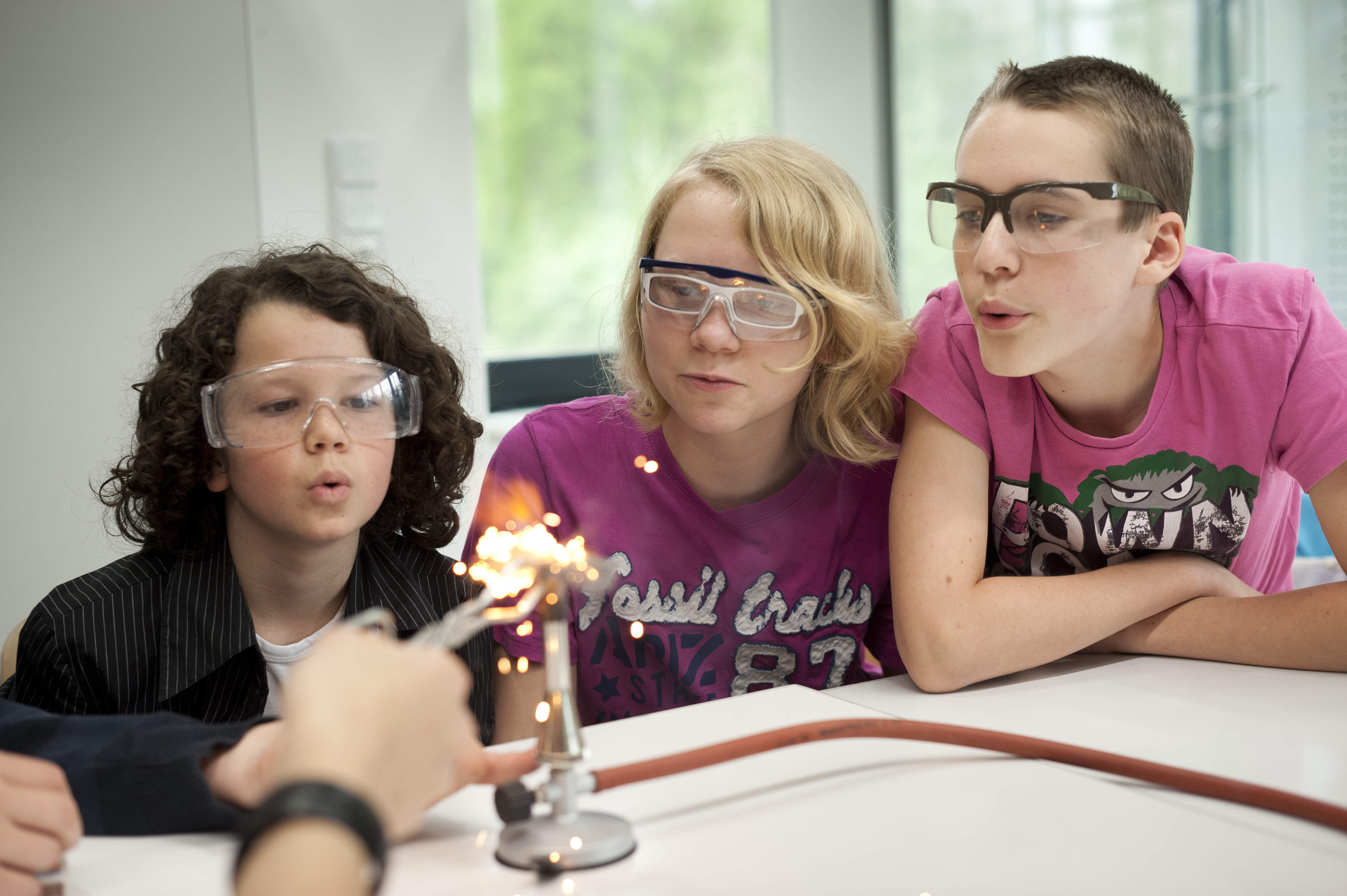 Schüler beim experimentieren am Science College